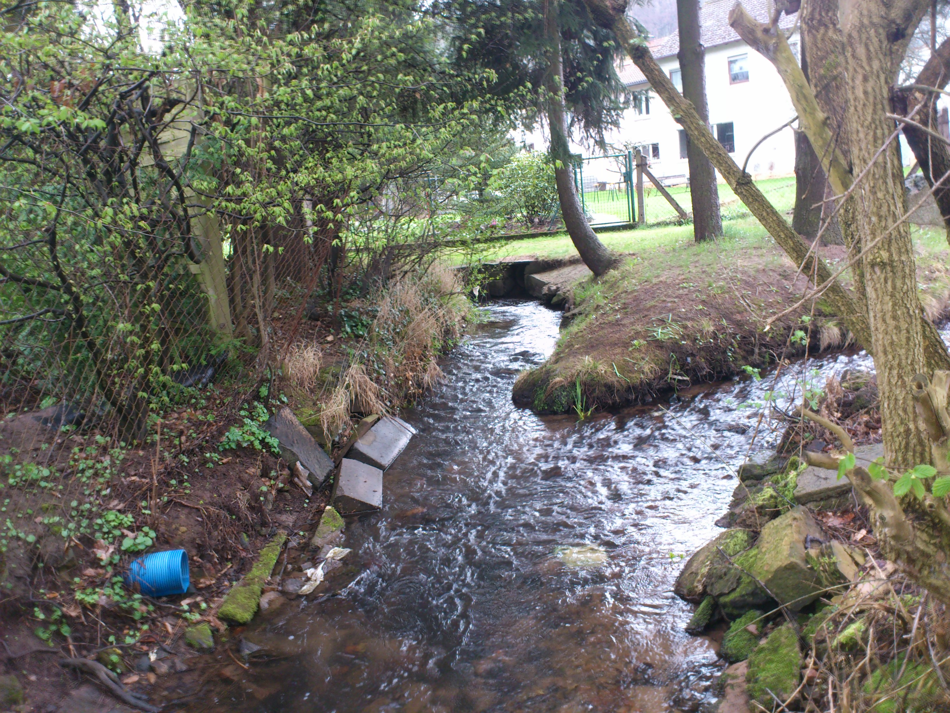 Zusammenfluss von Schwarzbach (hinten links) und Seebach (hinten rechts) zur Laufach (vorne)